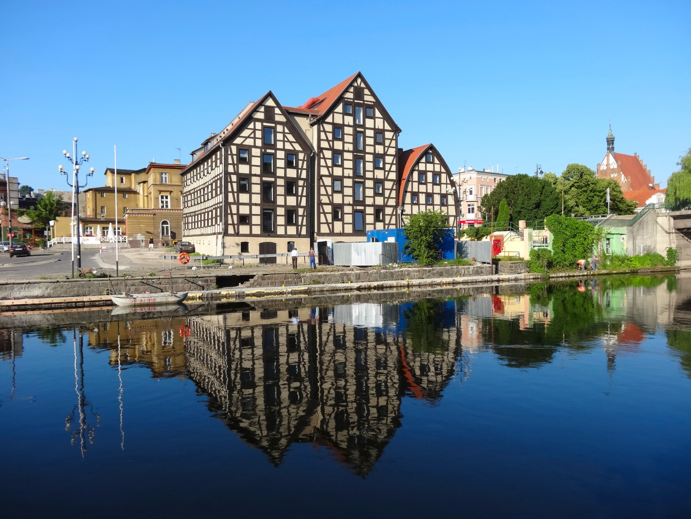 Spichrze nad Brdą w Bydgoszczy, zbud. w latach 1793-1800, od 1964 r. w gestii Muzeum Okręgowego